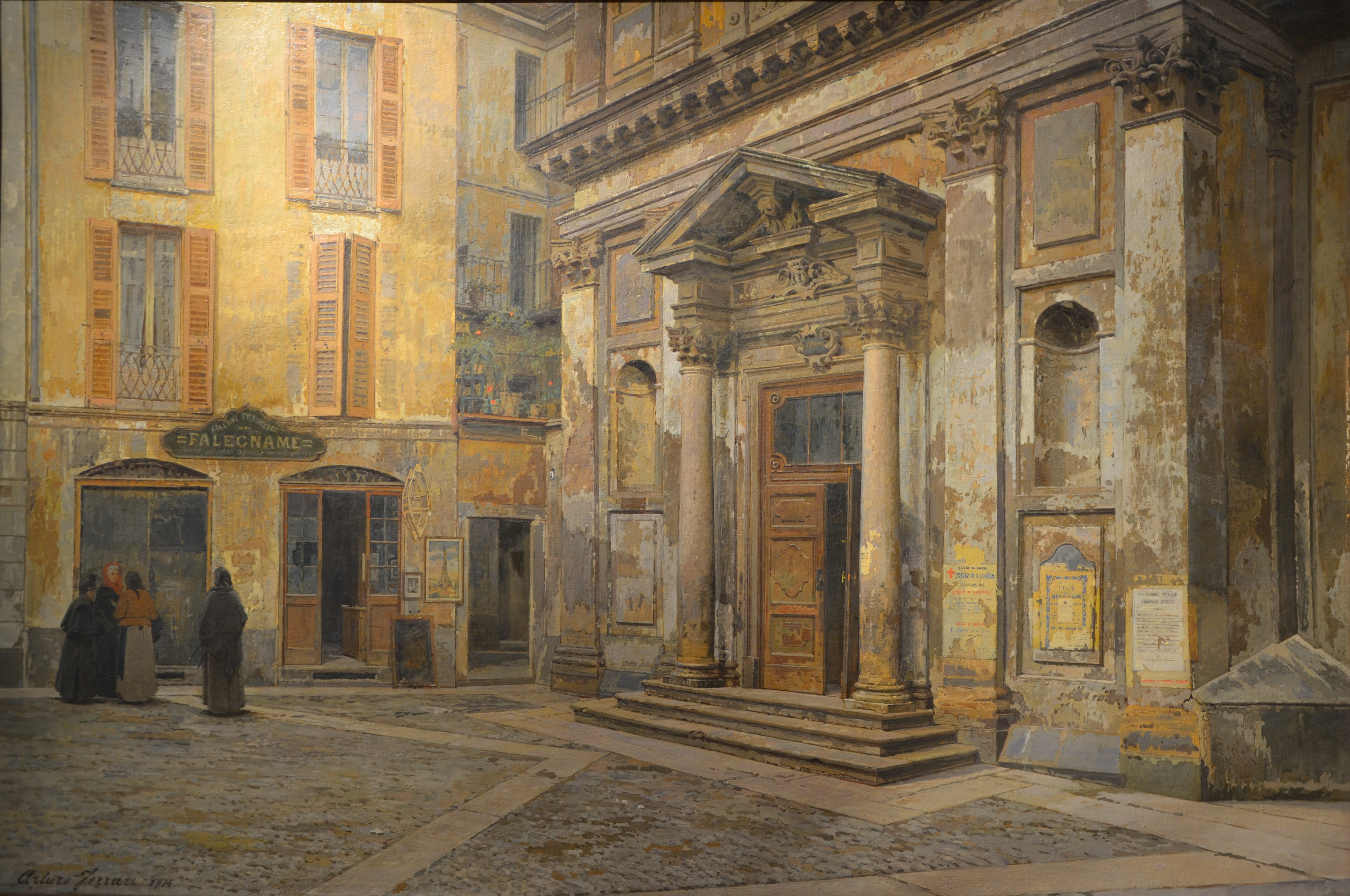 Arturo Ferrari, L'età che tramonta, San Vito al Pasquirolo, Milano (Accademia Tadini, Lovere)